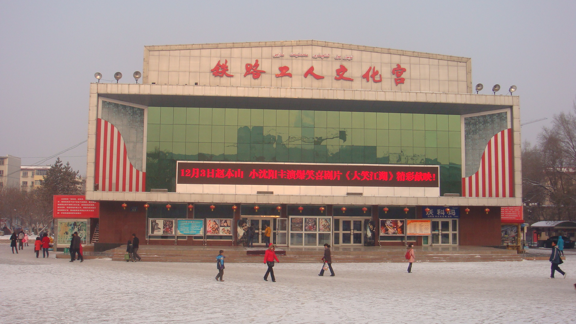 中国新疆乌鲁木齐市 China Xinjiang Urumqi, China Xinjiang Urumqi Welcome you to tour the, Китай Синьцзяна Урумчи приветствовать Вас на экскурсию, الصين ترحب زيارتك لاورومتشى فى شينجيانغ, 中国新疆のウルムチへの訪問を歓迎する, 中国新疆乌鲁木齐欢迎您来观光旅游